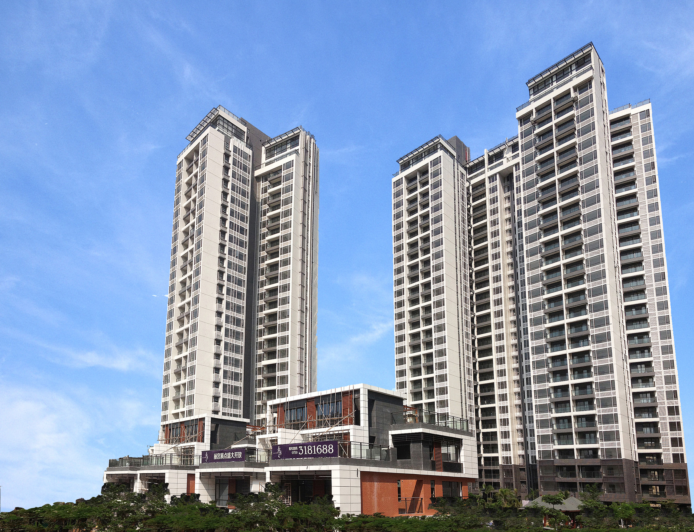 中文（新加坡）: 嘉峰匯豪庭全景圖